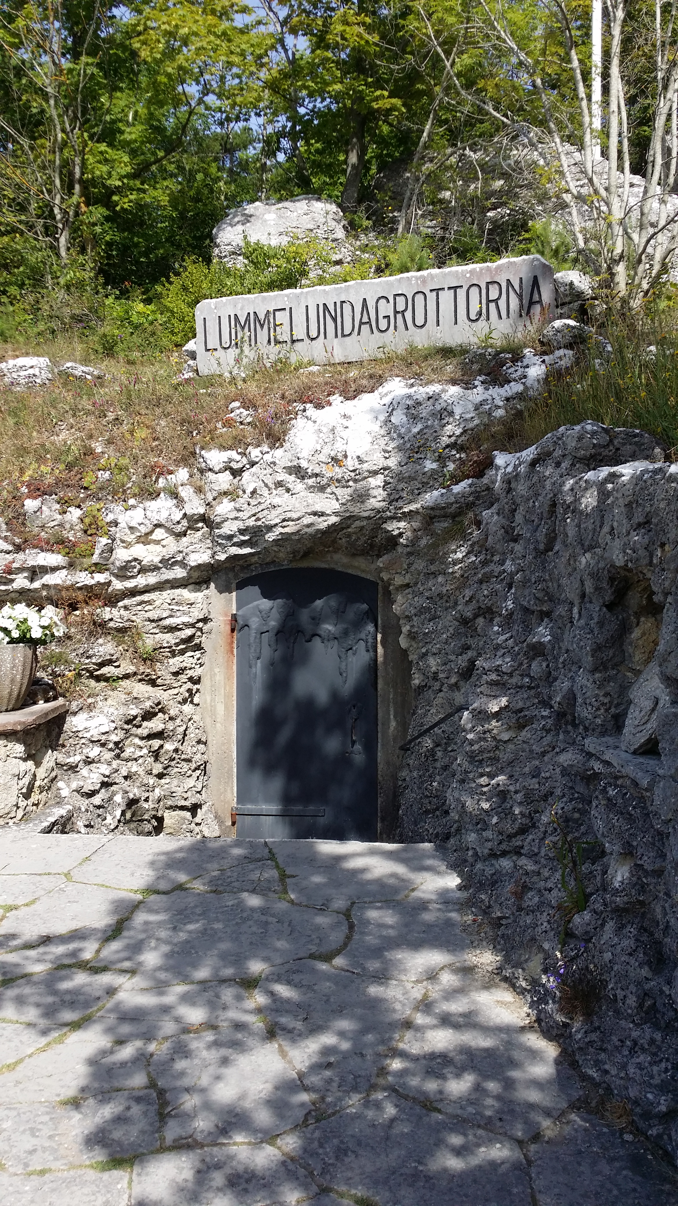 Ingången till Lummelundagrottan på Gotland.